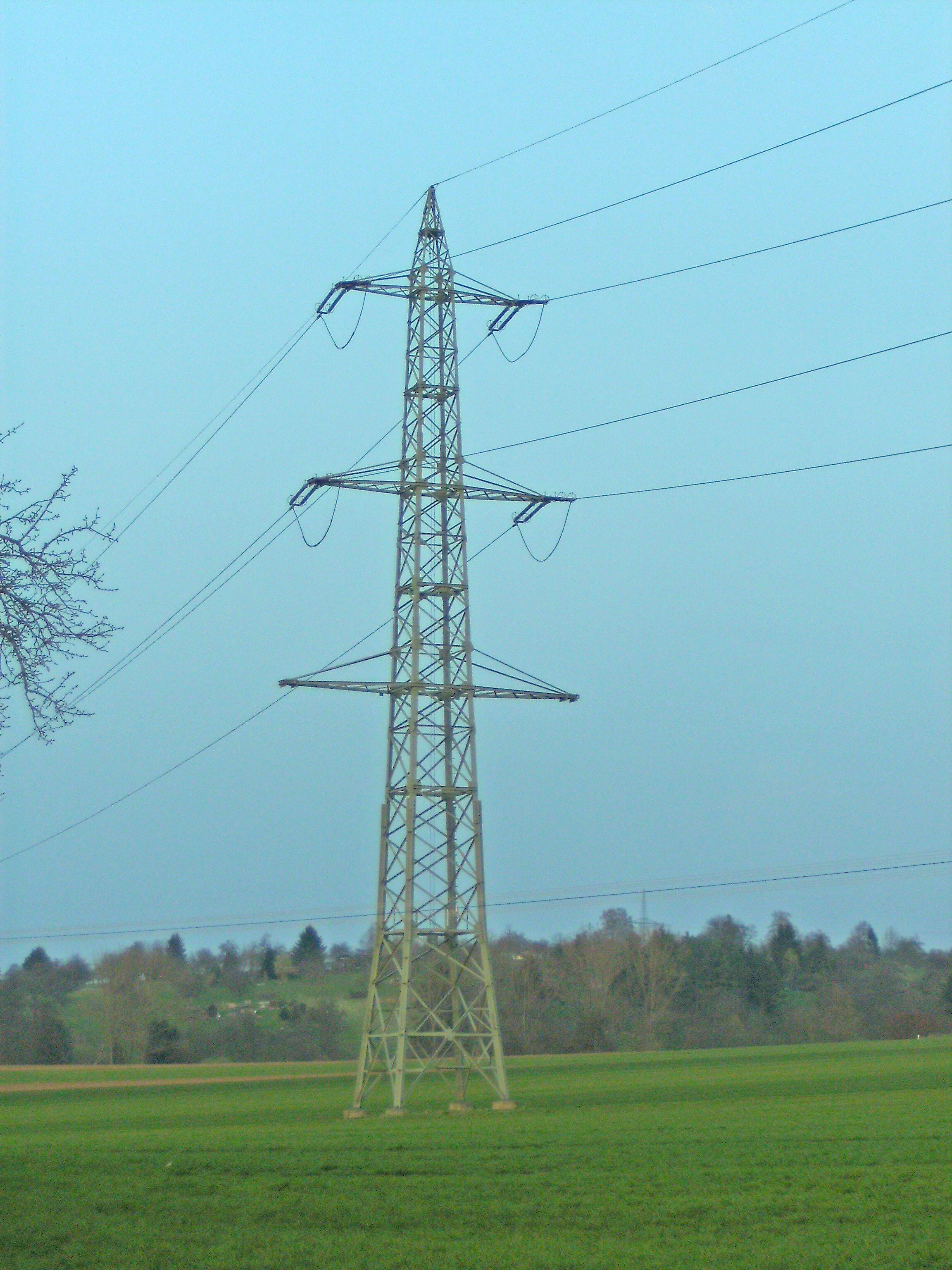 Abspannmast der Schwarzwaldleitung westlich (?) von Mittelstadt. Die Traversenabstände sind so groß gewählt worden, daß an diesem Mast zusätzliche Traversen für einen Leitungsabzweig zum nie realisierten Kernkraftwerk Mittelstadt hätten montiert werden können.